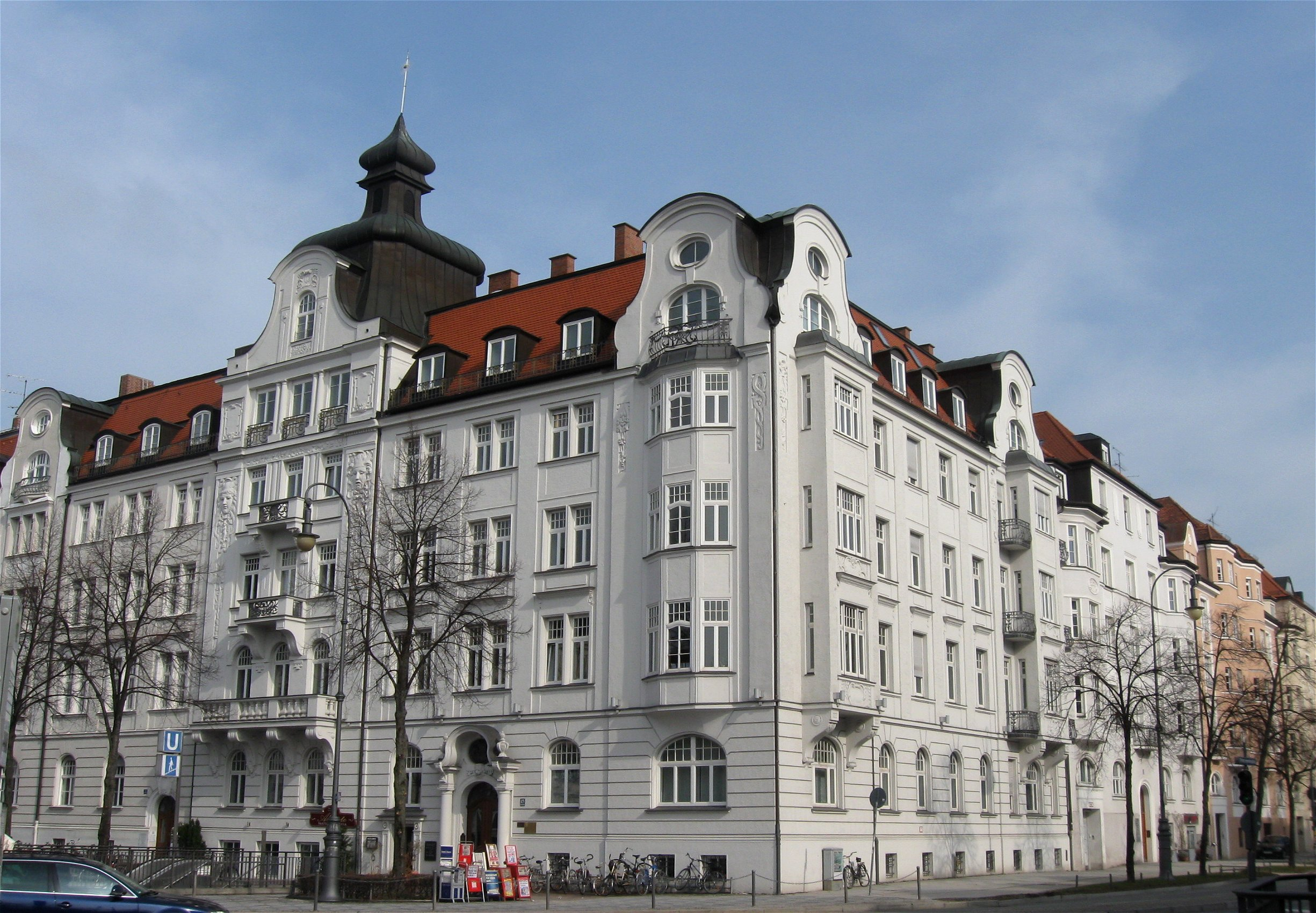 Prinzregentenplatz 23; Eckhaus, barockisierender Jugendstil, mit Kuppelaufsatz und Stuckdekor, um 1900 wohl von Carl Vent; Gruppe mit Nr. 21.